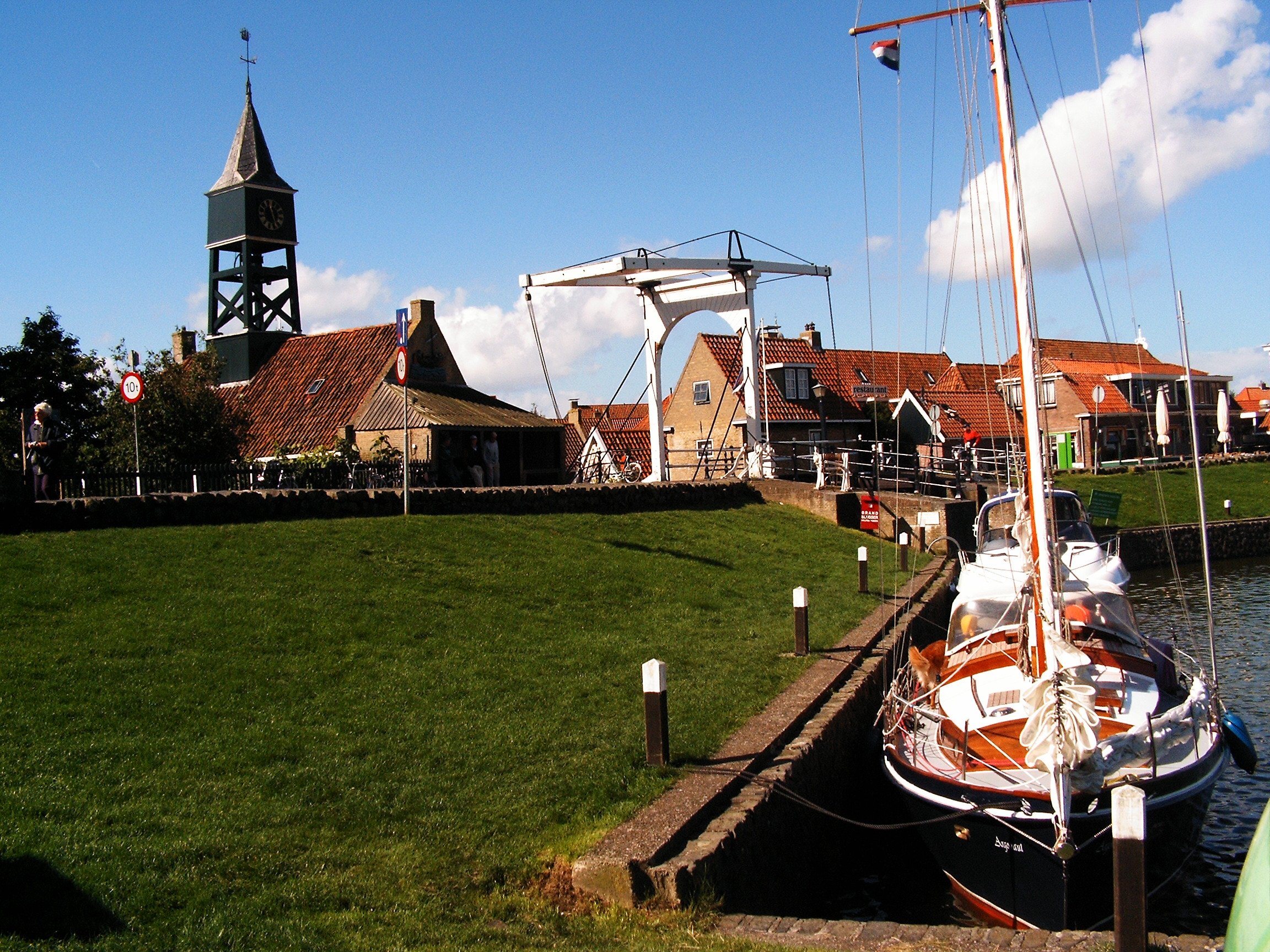 Hindeloopen- Hafen